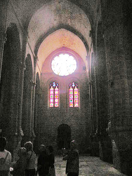 Abbaye de Fontfroide, Abteikirche, Mittelschiff nach W